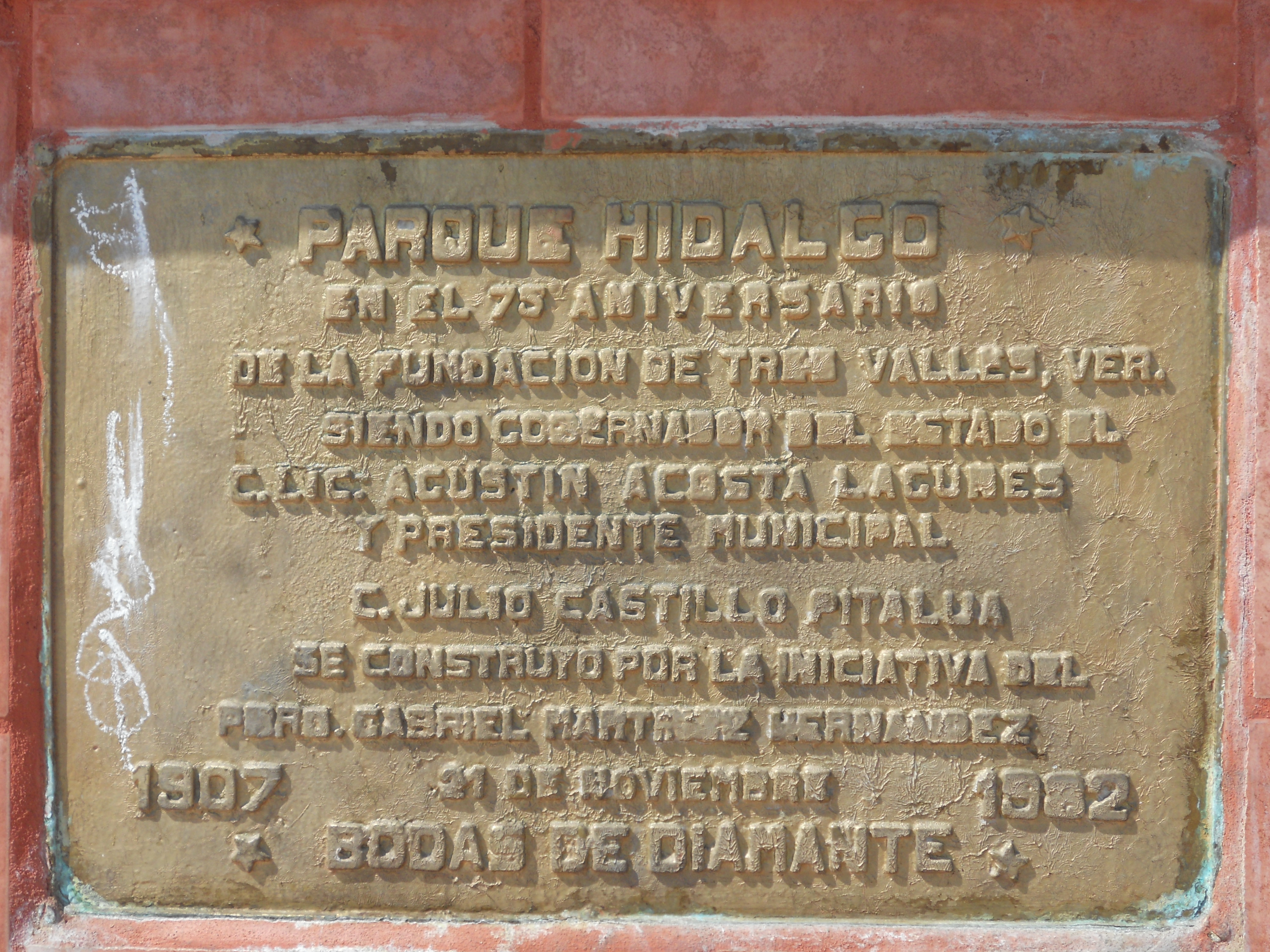 Placa del monumento a Miguel Hidalgo en el municipio de Tres Valles, localizada en el zocalo.